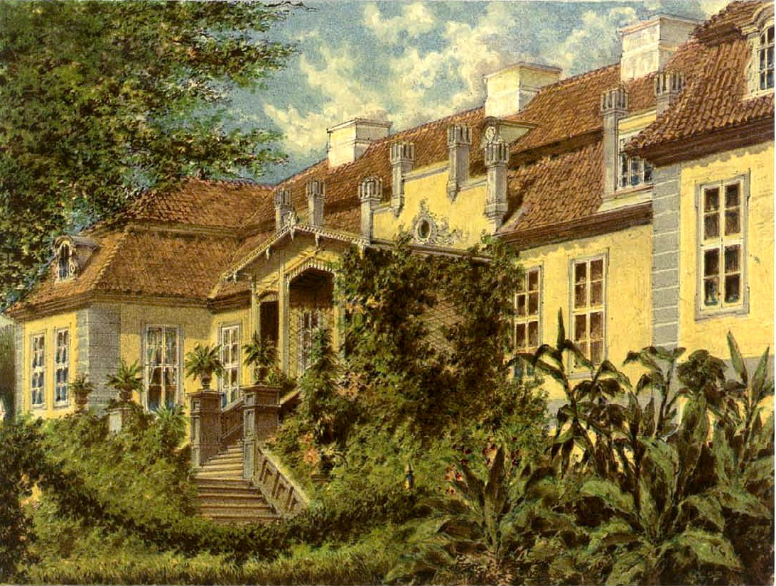 Schloss Domnau, Kreis Friedland